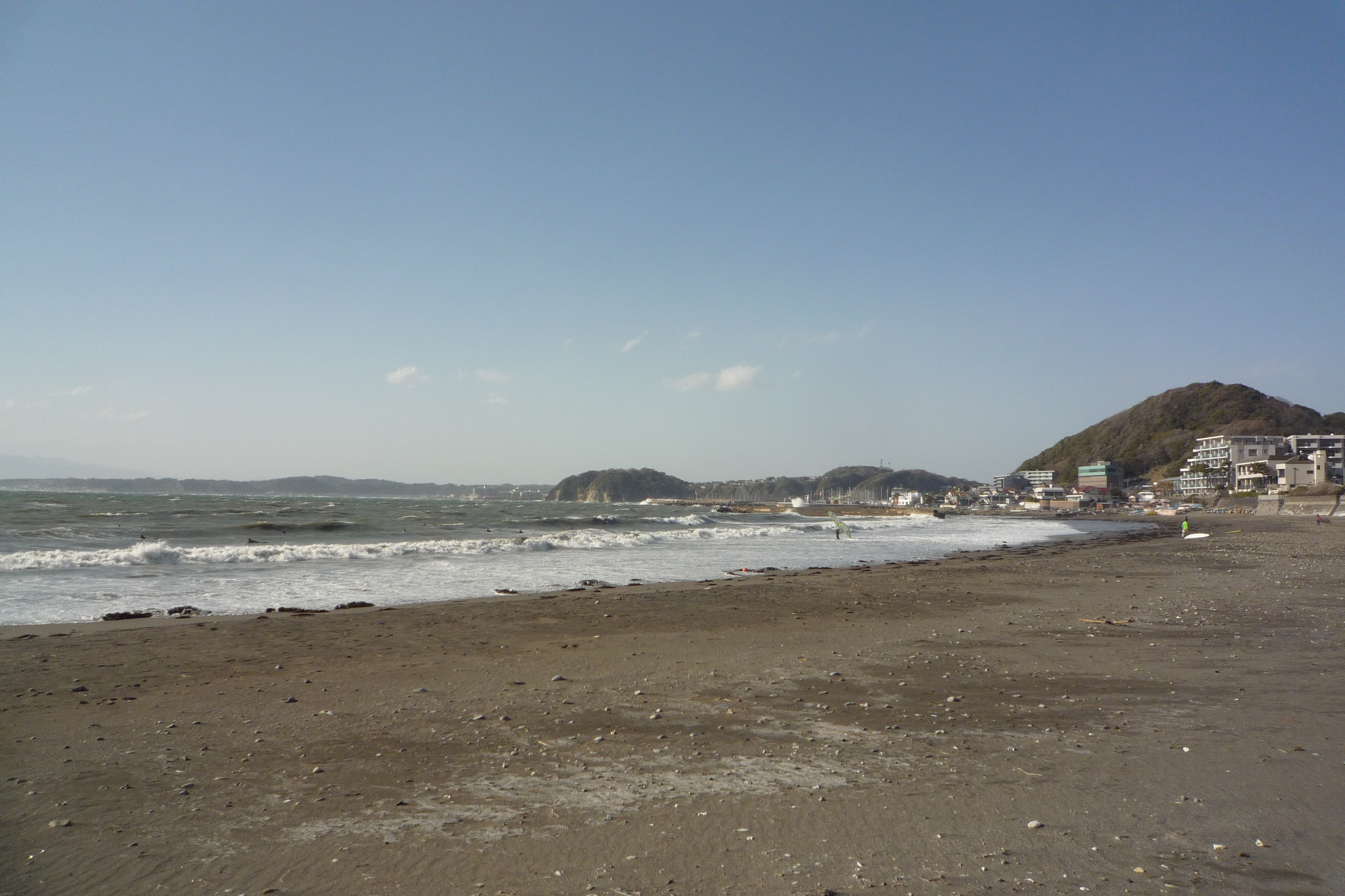 葉山海岸の画像